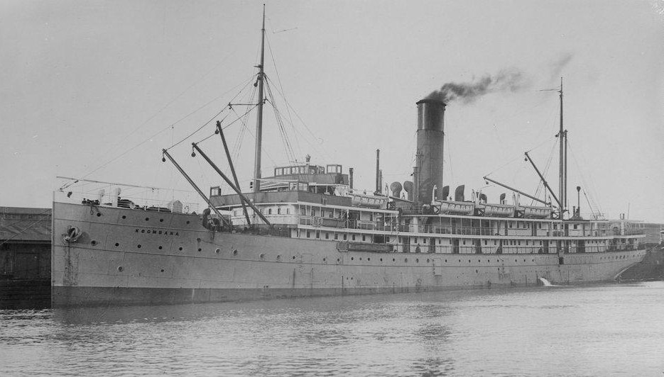 SS Koombana